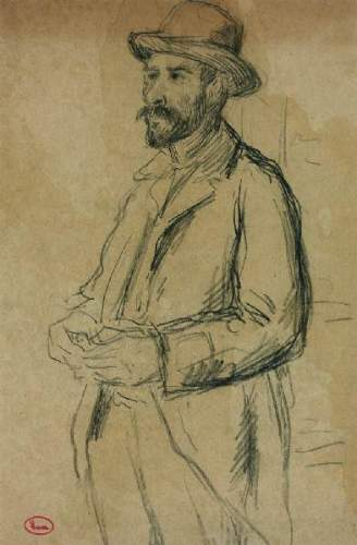 Portrait d'Augustin Hamon par Maximilien Luce. Crayon noir sur papier beige, 29 x 19 cm, cachet rouge de l'atelier en bas à gauche, esquisse préparatoire pour le portrait au pastel d'Augustin Hamon, collection particulière (Jean Bouin-Luce et Denise Bazetoux, Maximilien Luce, Catalogue raisonné, Paris, éditions JBL, Paris, 1986, tome II, n°739, p.187).